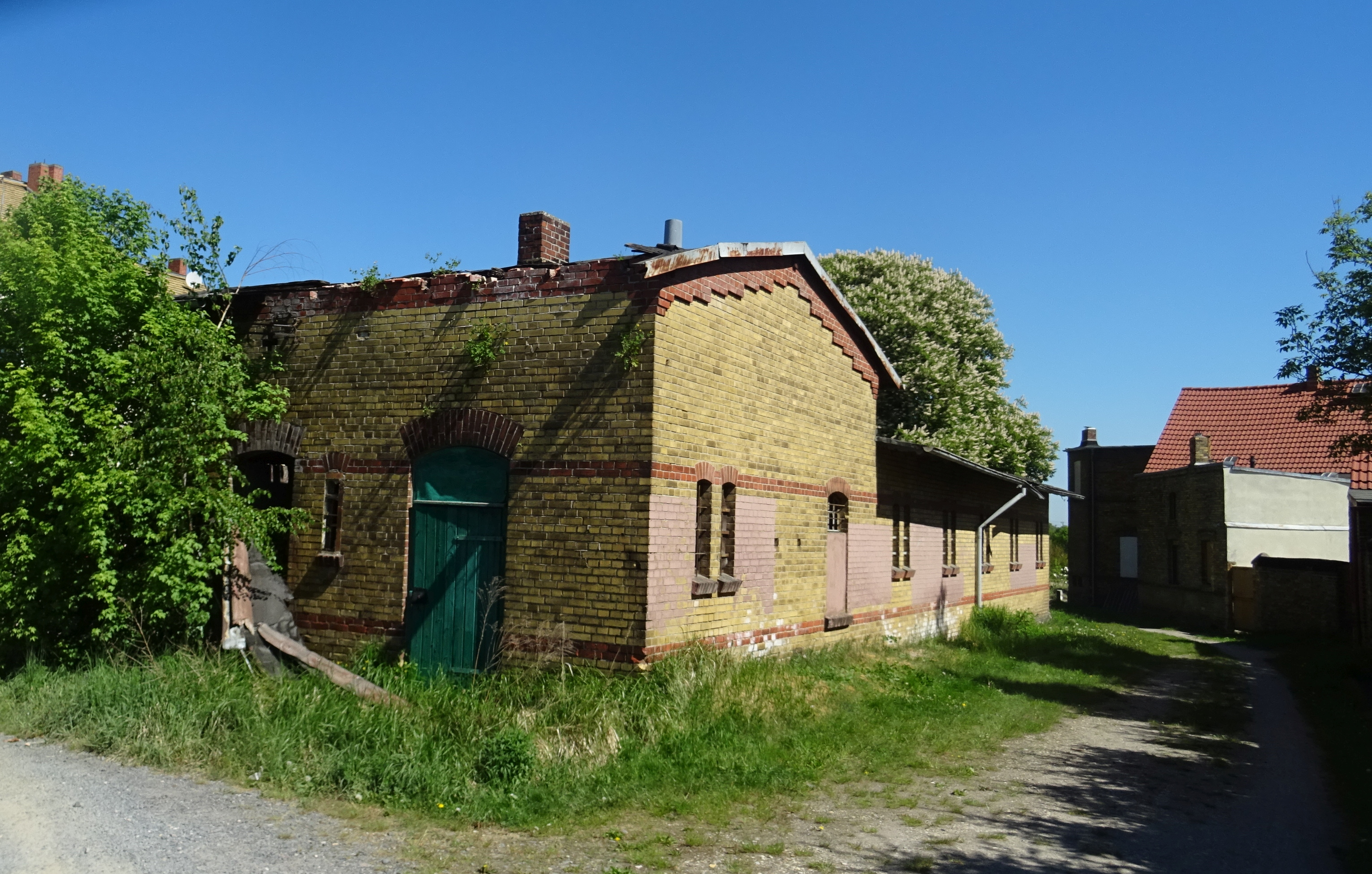 Bahnhof Zahna, denkmalgeschützter Güterschuppen, Blick von Südwesten